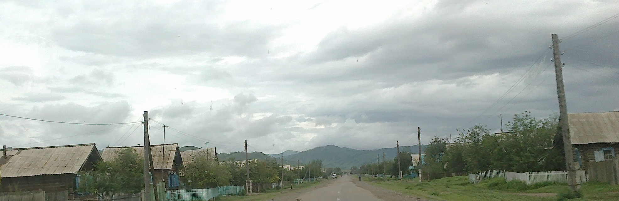 Одна из улиц Б. Нарына